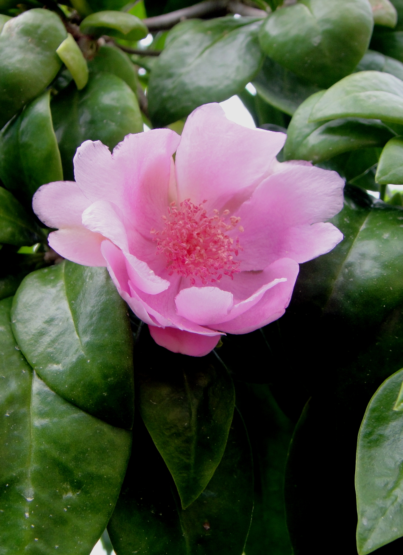 Rosa de Bayahibe (Pereskia quisqueyana)